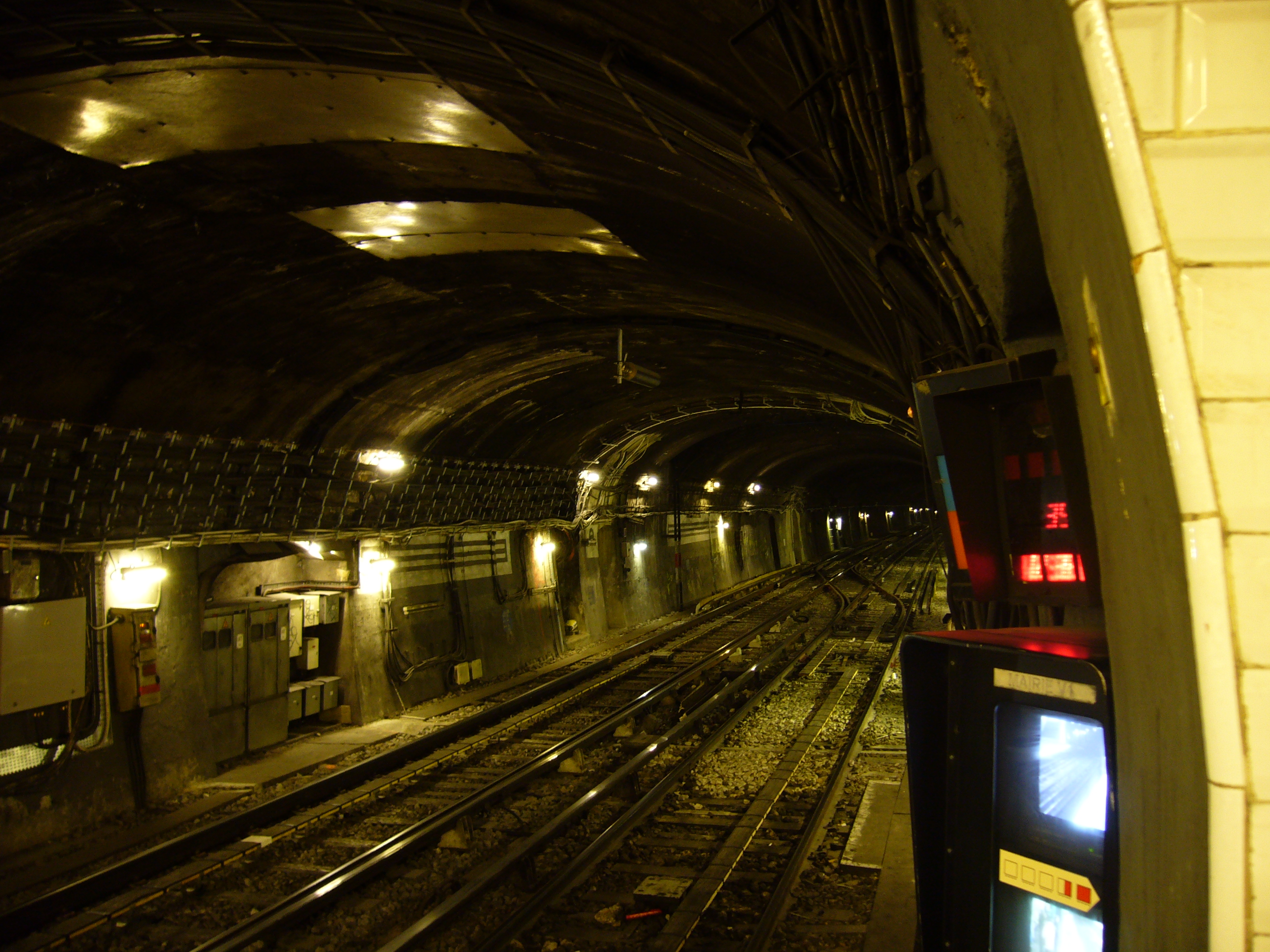 Vue du tunnel à la station Mairie d'Issy sur la ligne 12 du métro de Paris.